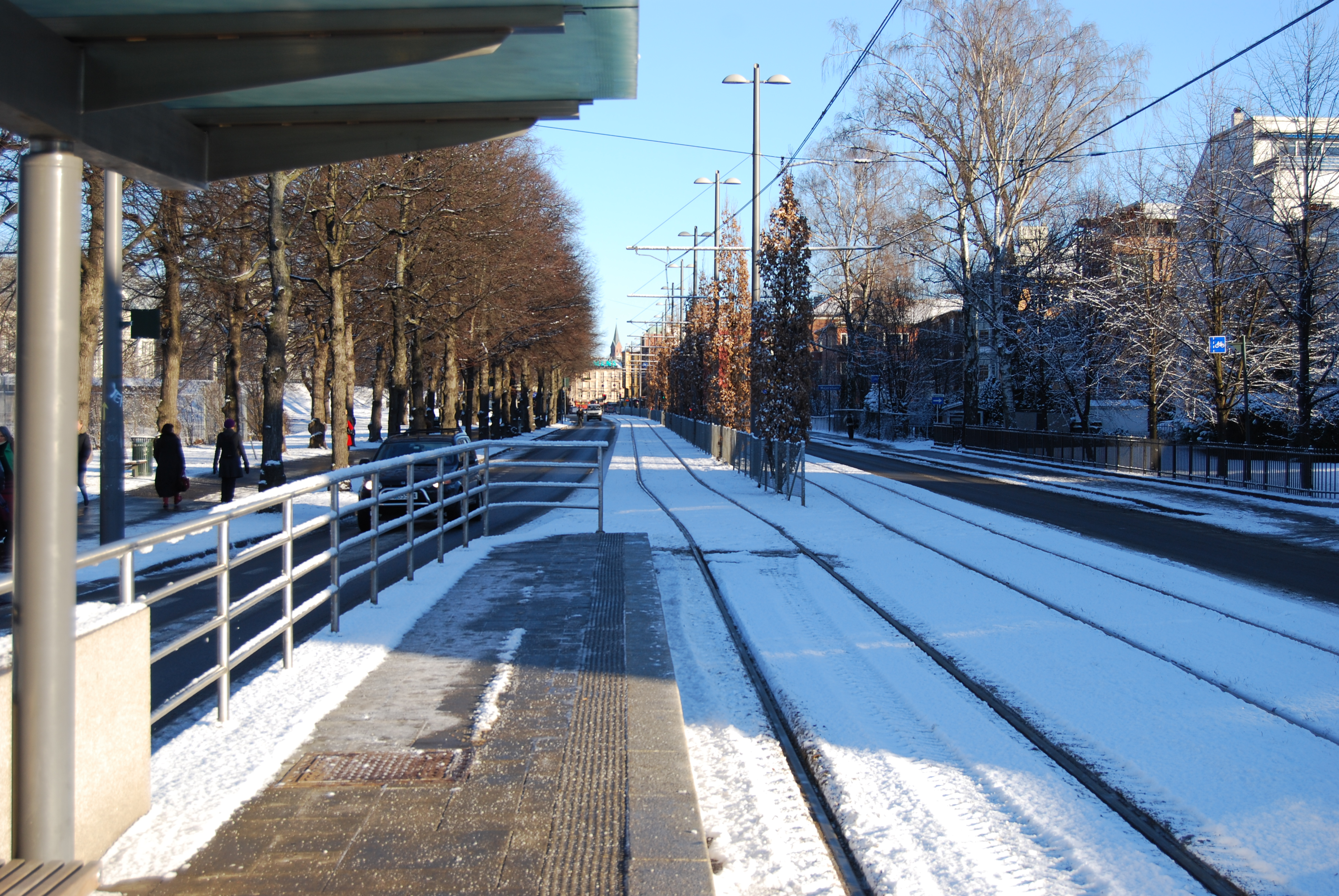 Trikkestopp i Kirkeveien retning Majorstua i Oslo